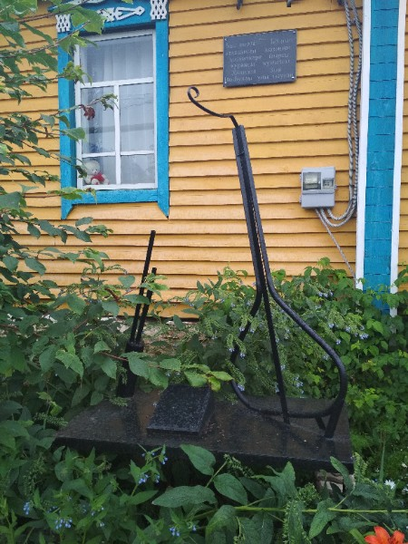 Башҡортса: Зыя Хәлилов тыуған йорттағы мемориаль таҡтаташ һәм стела